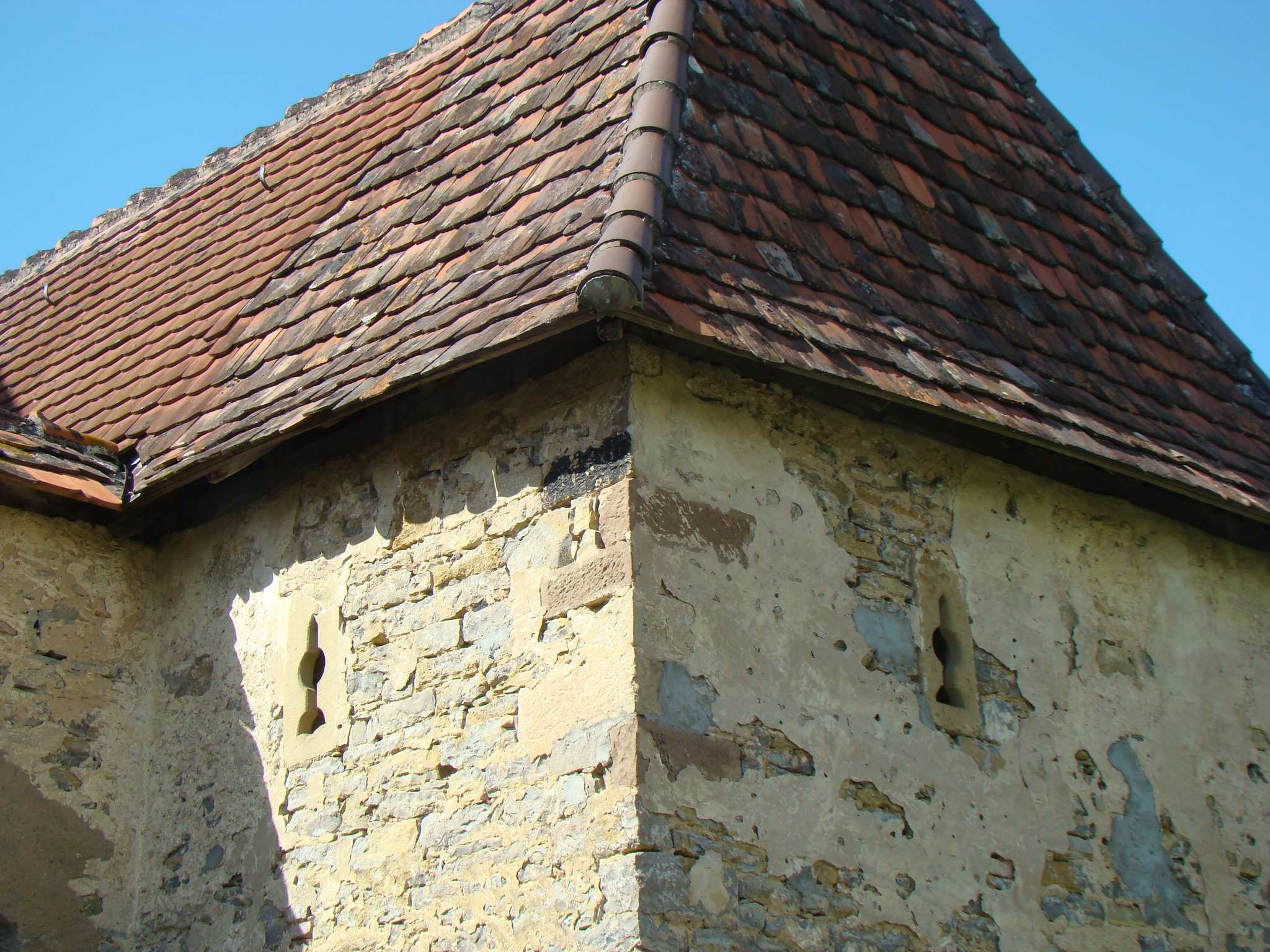 Sinsheim-Ehrstädt, Schloss Neuhaus, Nebengebäude